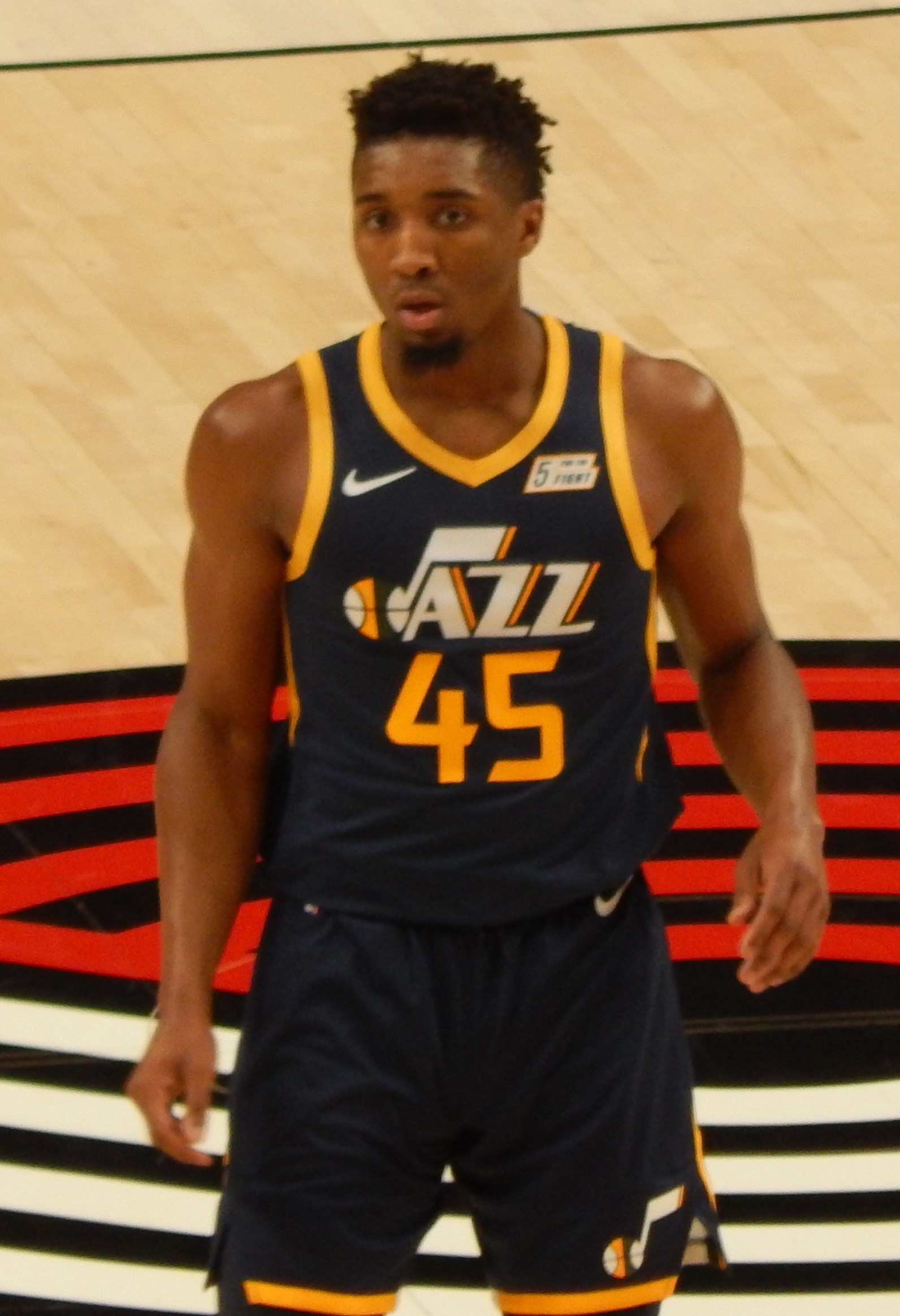 Donovan Mitchell #45 of the Utah Jazz against the Portland Trail Blazers on October 7, 2018 at Moda Center in Portland, Oregon.